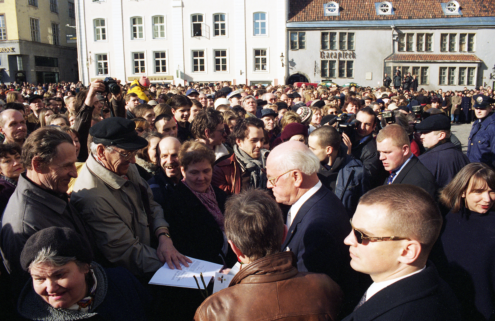 Lennart Meri, Eesti president Raekoja platsil 99